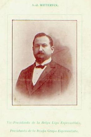 Fotokaart van A.J. Witteryck uit 1910.